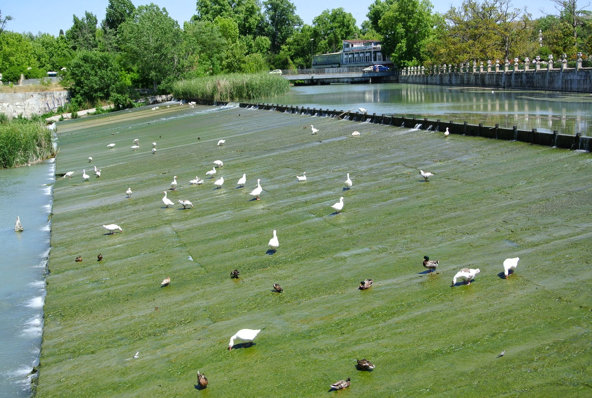 28300 Aranjuez, Madrid, Spain